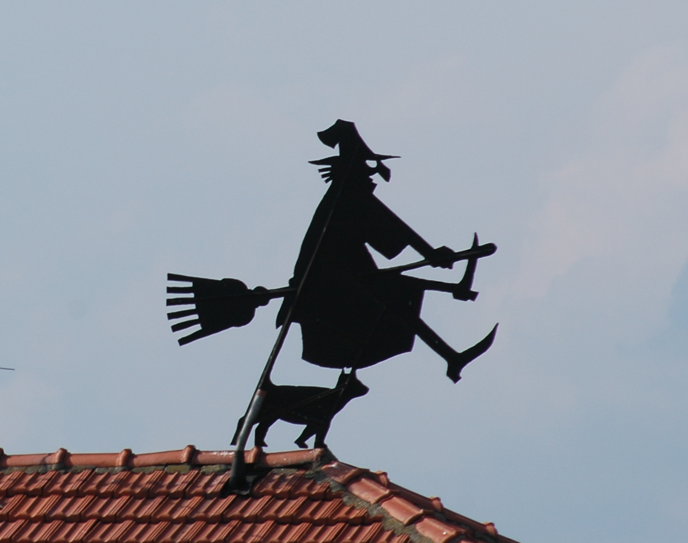 Statue en fer forgé de sorcière à Gravellona Lomellina en Italie.